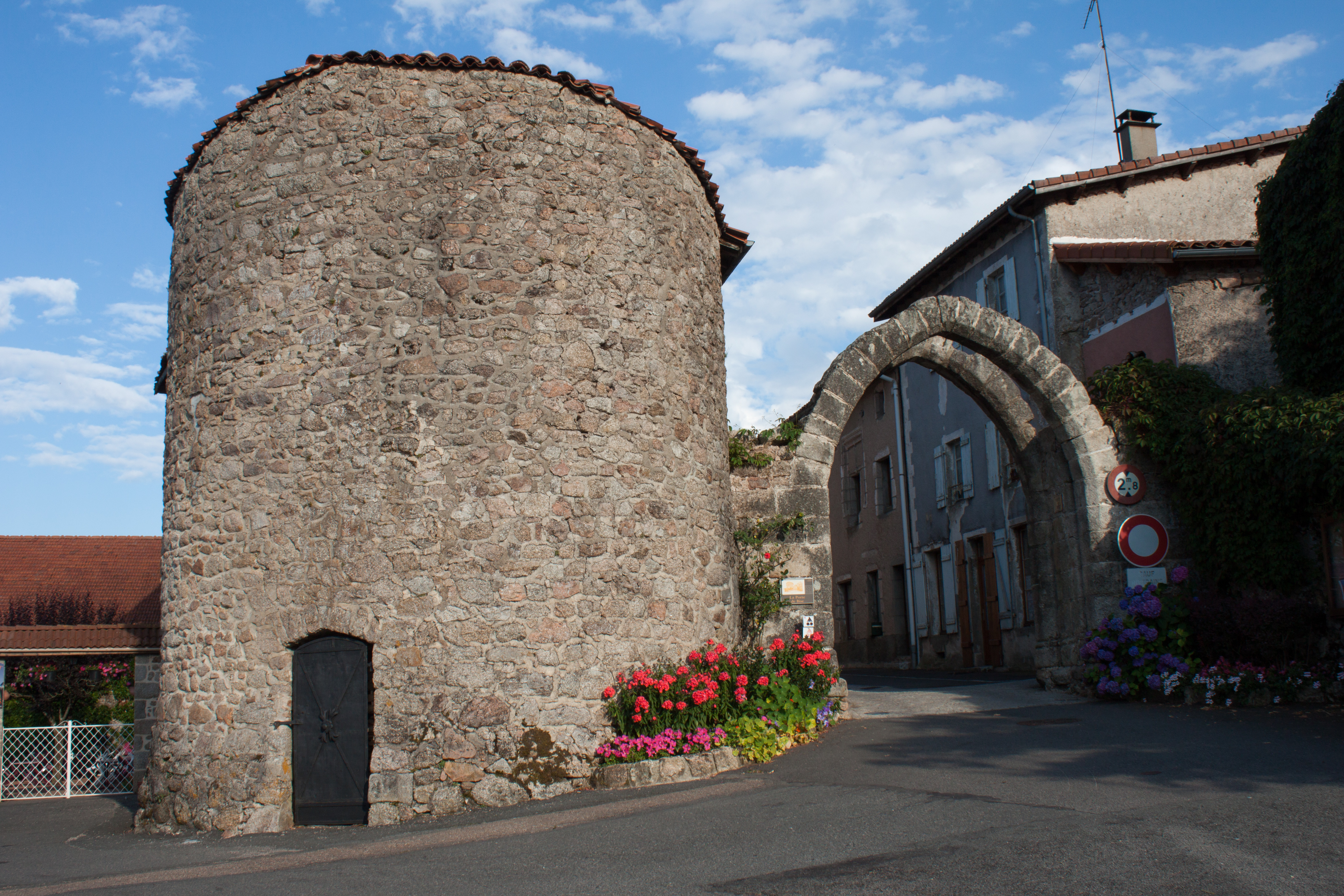 Porte de Bise à Cervières (42)